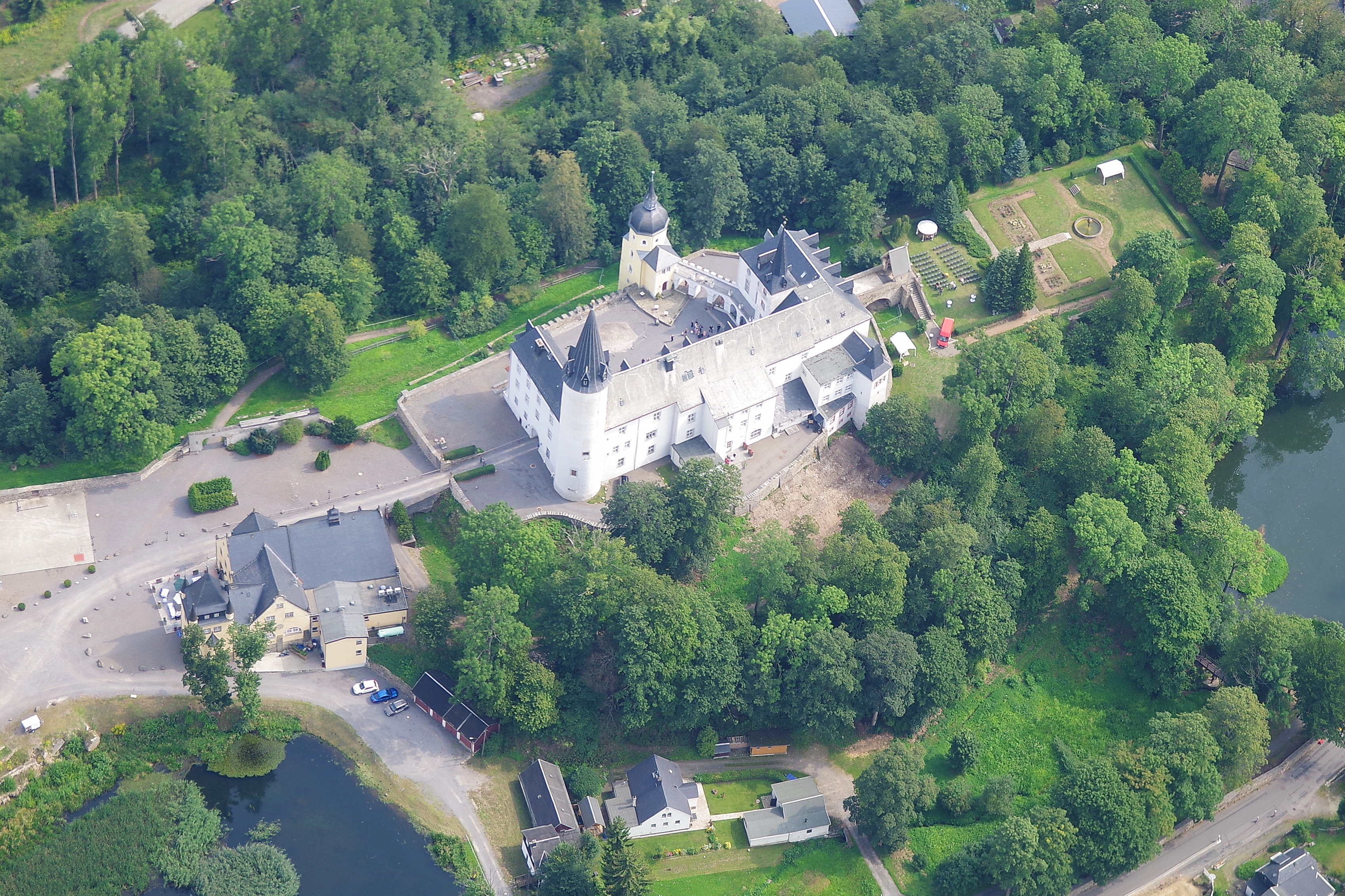 Schloss Purschenstein in Neuhausen